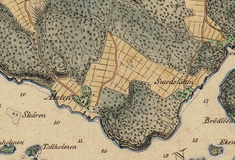 Del av karta öfver Belägenheten omkring Stockholm / utgifven af W. M. Carpelan 1817 visande Ålsten, Smedslätten; (1817 års karta över Stockholm med omgivningar. Karta över belägenheten omkring Stockholm utgiven av W.M. Carpelan 1817. Vattendjup och torg är särskilt markerade. Vägnät, kvarter och kyrkor är ditritade. Utanför staden är boställen såsom torp och byar synliga. Kartan utgiven 1817 av Wilhelm Maximilian Carpelan.